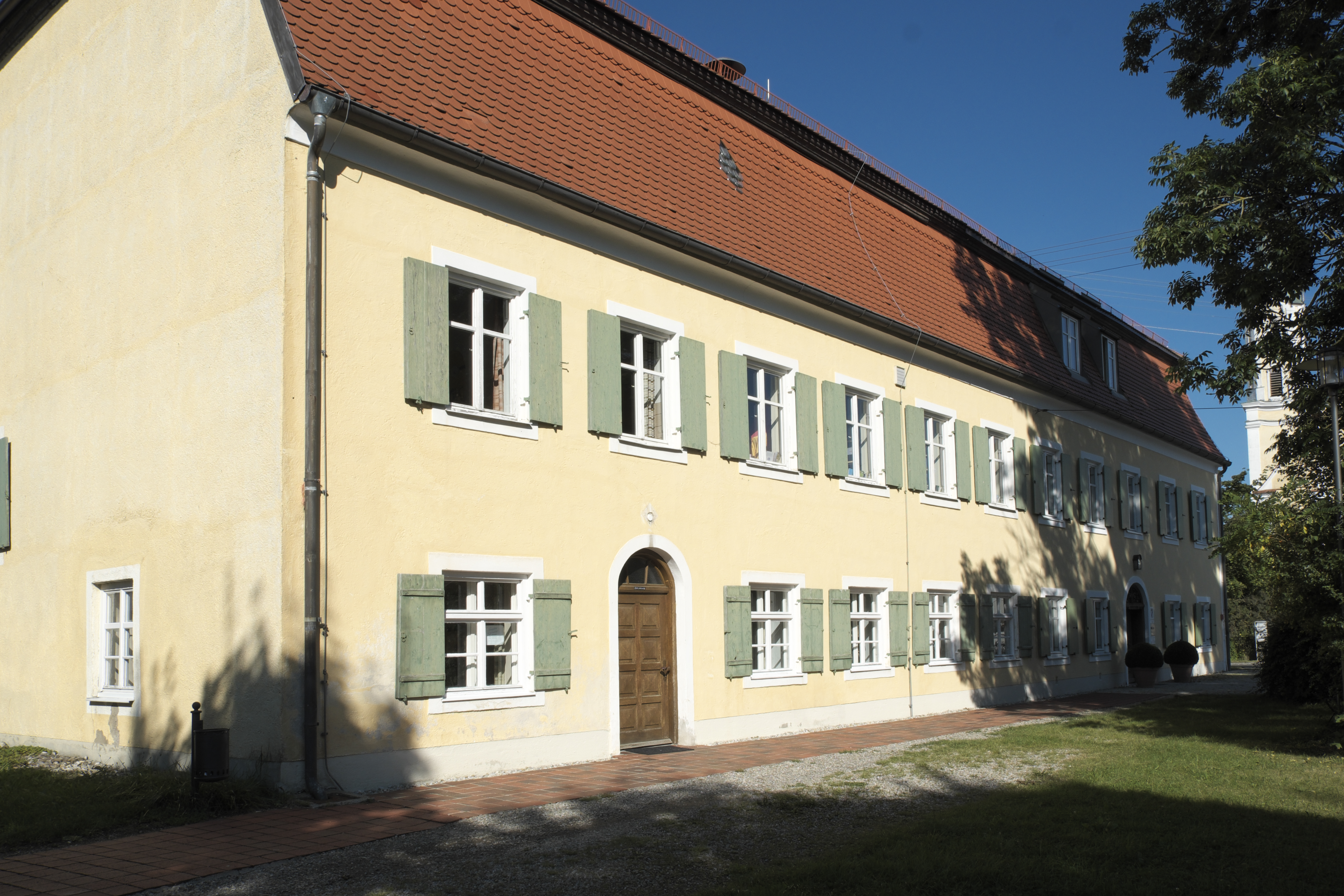 Ehemaliger Pfarrhof, heute Rathaus der Gemeinde Igling in Unterigling im Landkreis Landsberg am Lech (Bayern/Deutschland)